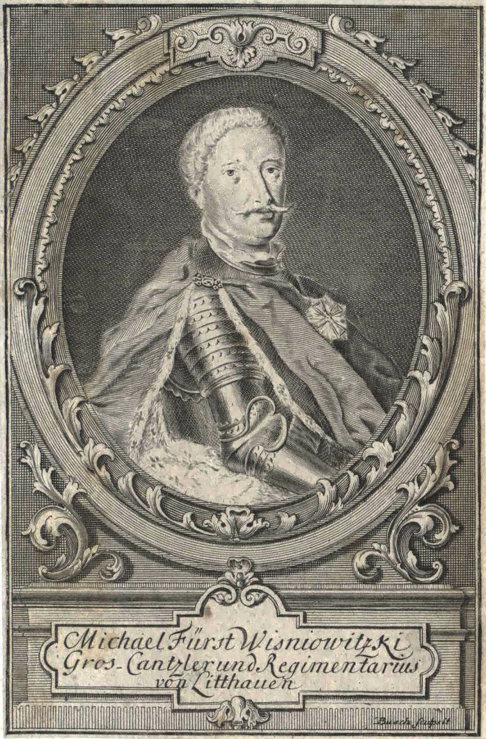 Беларуская (тарашкевіца): Партрэт Міхала Сэрвацыя Вішнявецкага (Michał Servacy Višniaviecki)